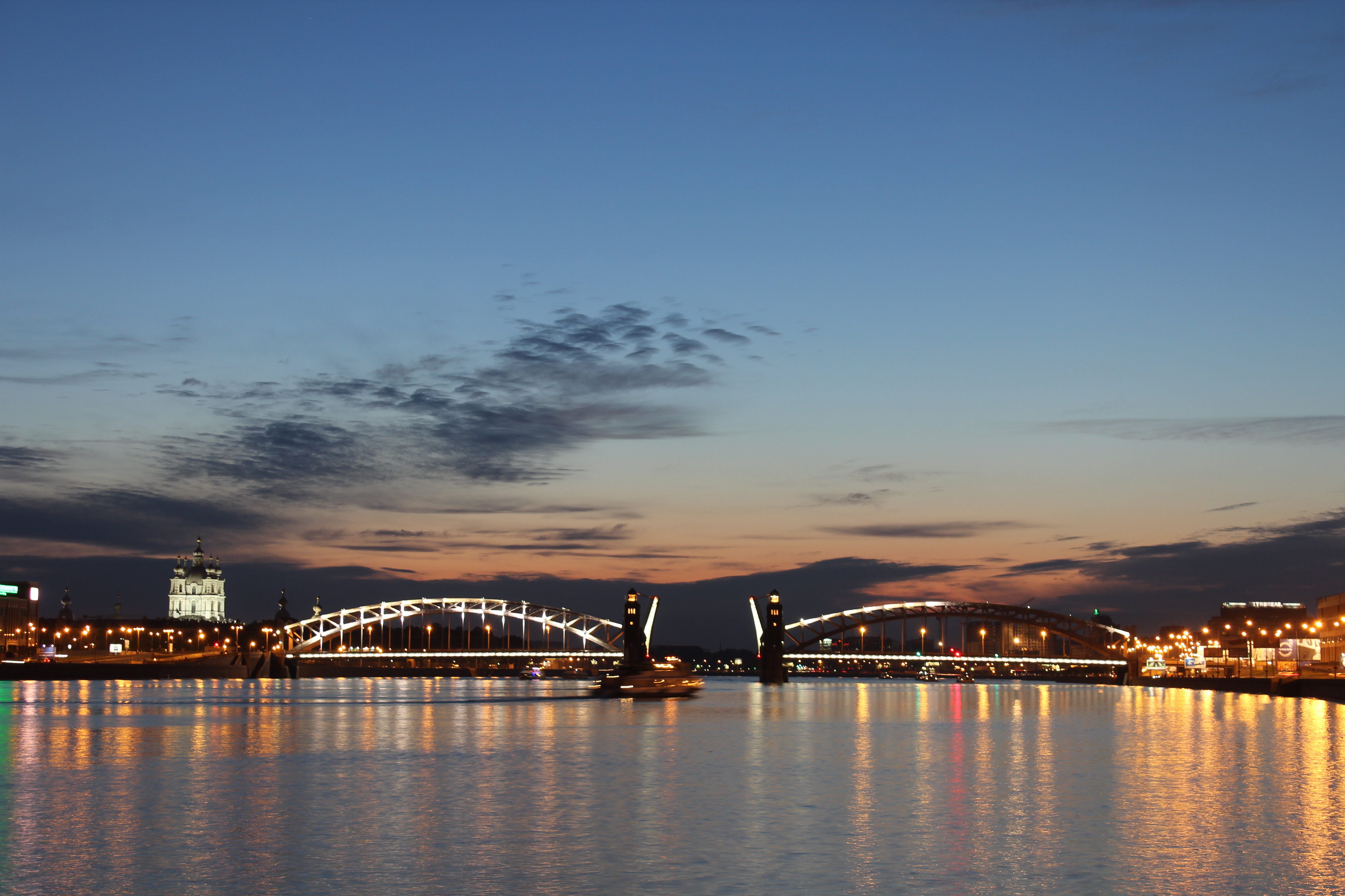 Большеохтинский мост, Санкт-Петербург